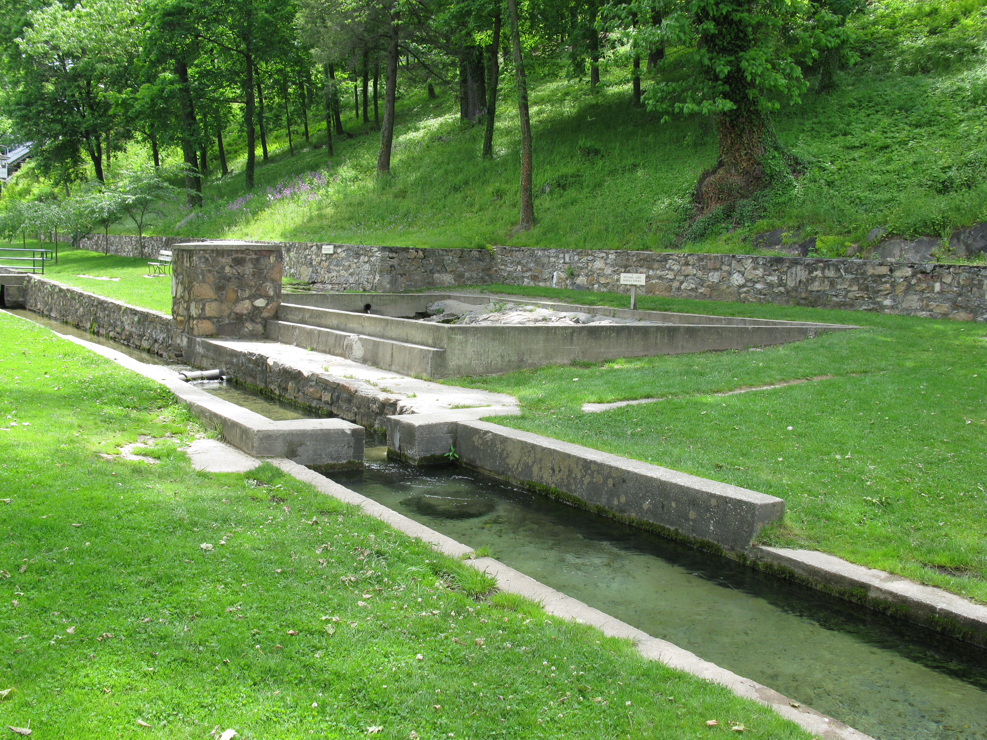 Berkeley Springs State Park, Bath (Berkeley Springs), West Virginia